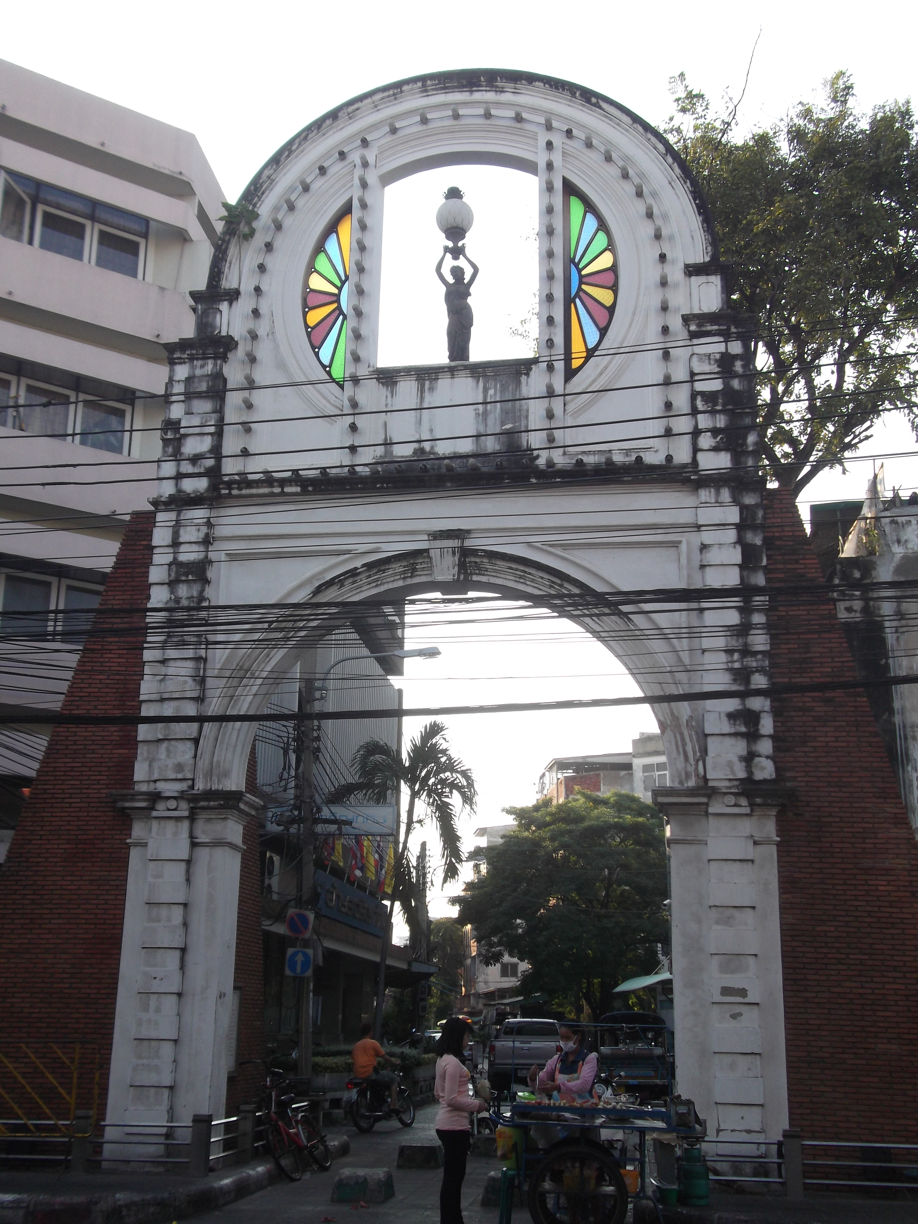 ซุ้มประตูแพร่งสรรพศาสตร์